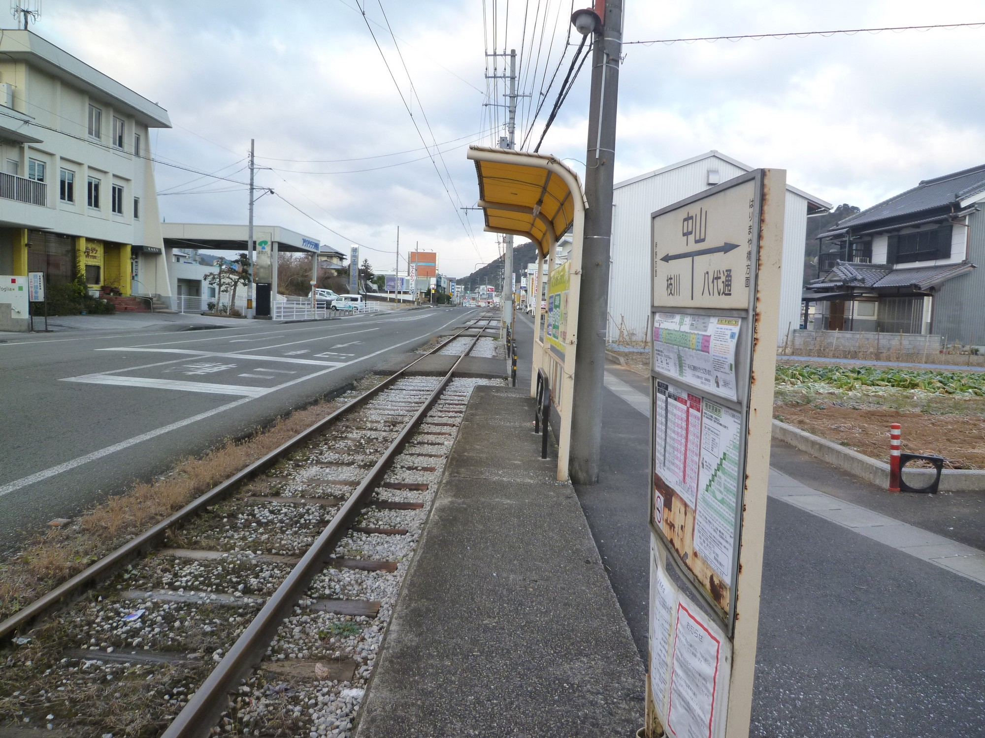 2015年1月2日撮影。